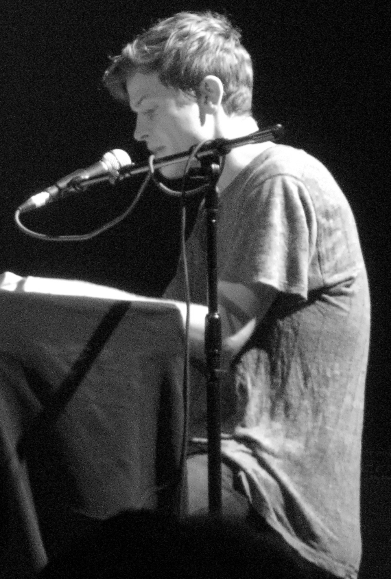 Perfume Genius